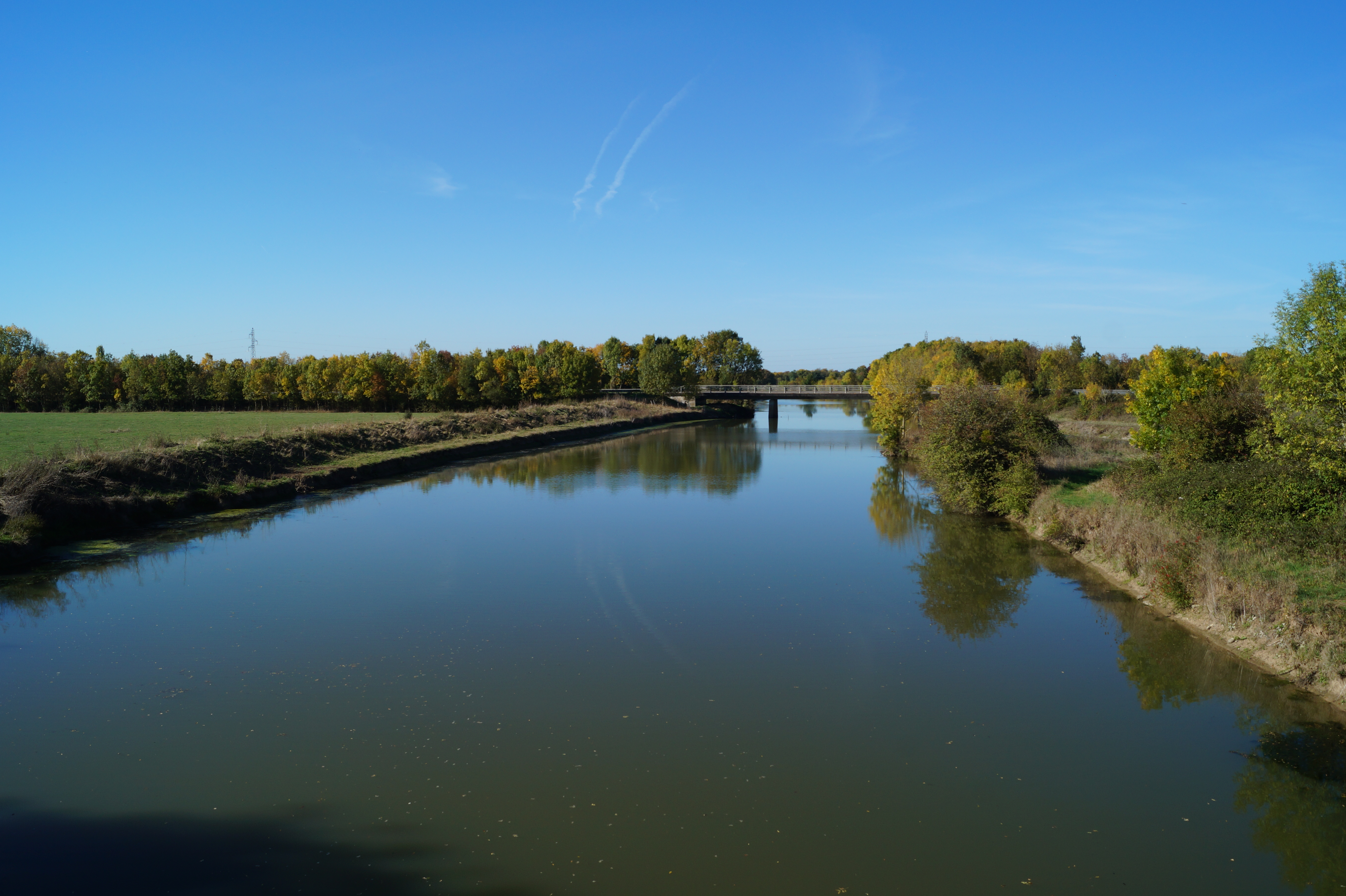 La déviation de la route de Fontenay aux Sables.